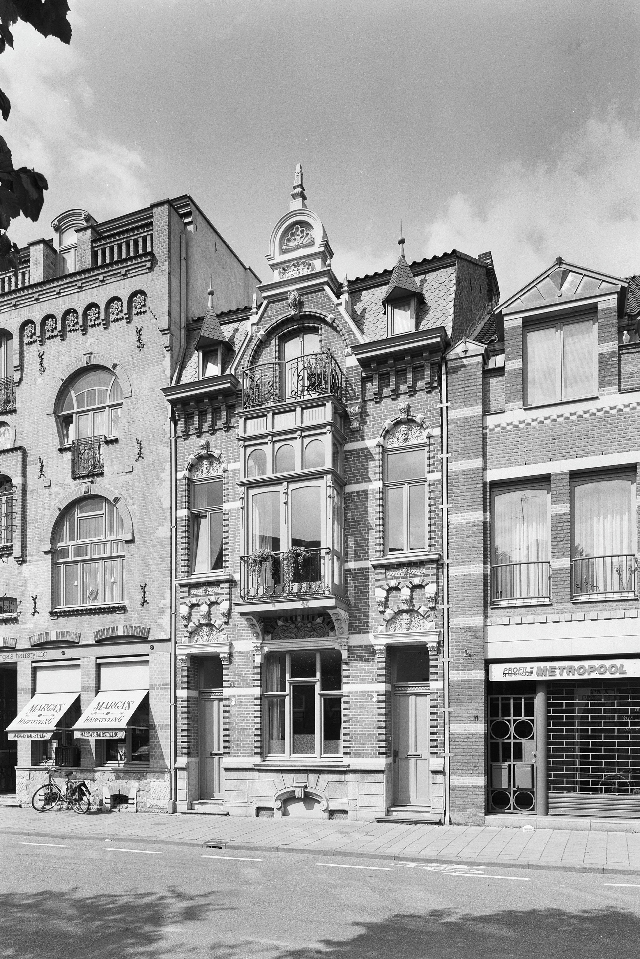 Overzicht voorgevel